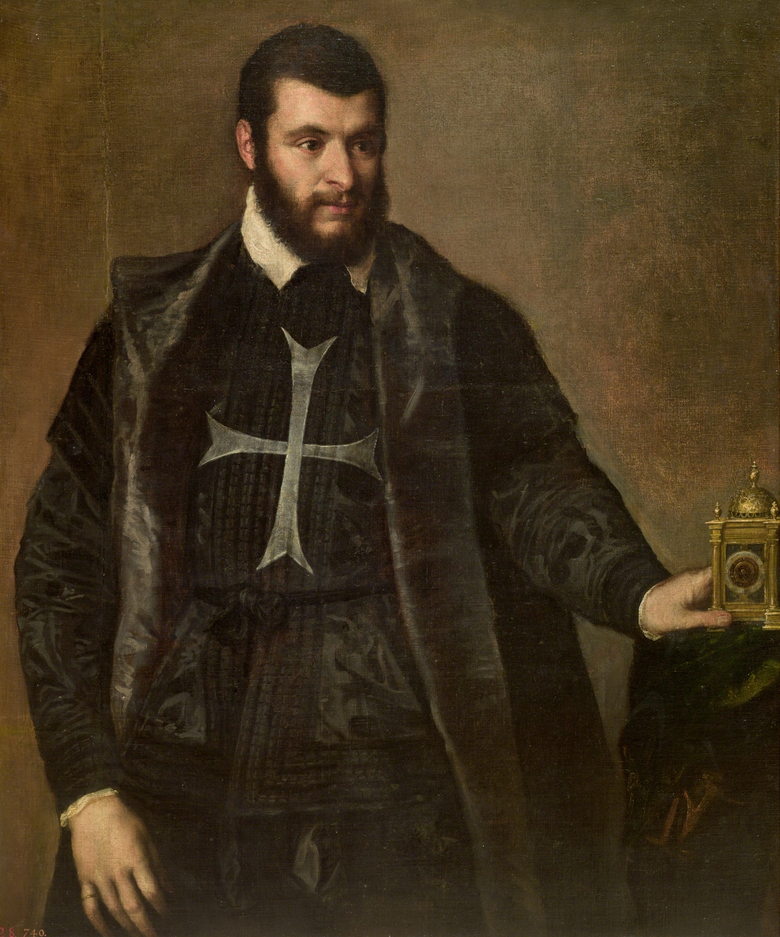 Retrato de un desconocido caballero de la Orden de Malta, que aparece junto a una mesa en la que hay un reloj que ha terminado por dar nombre a la obra.